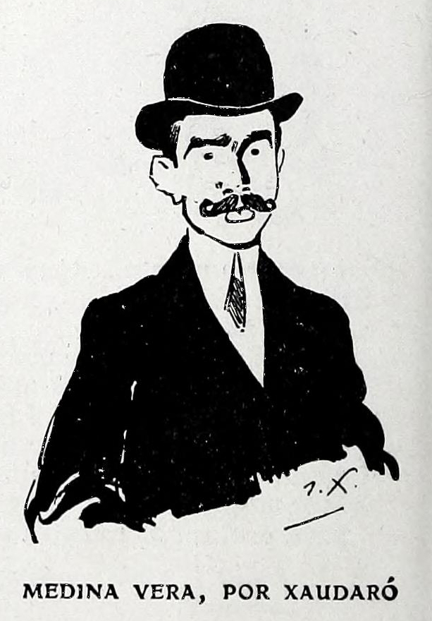 Inocencio Medina Vera.